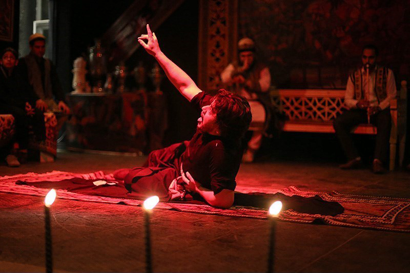 شاهنامه‌خوانی و نقالی در قزوین